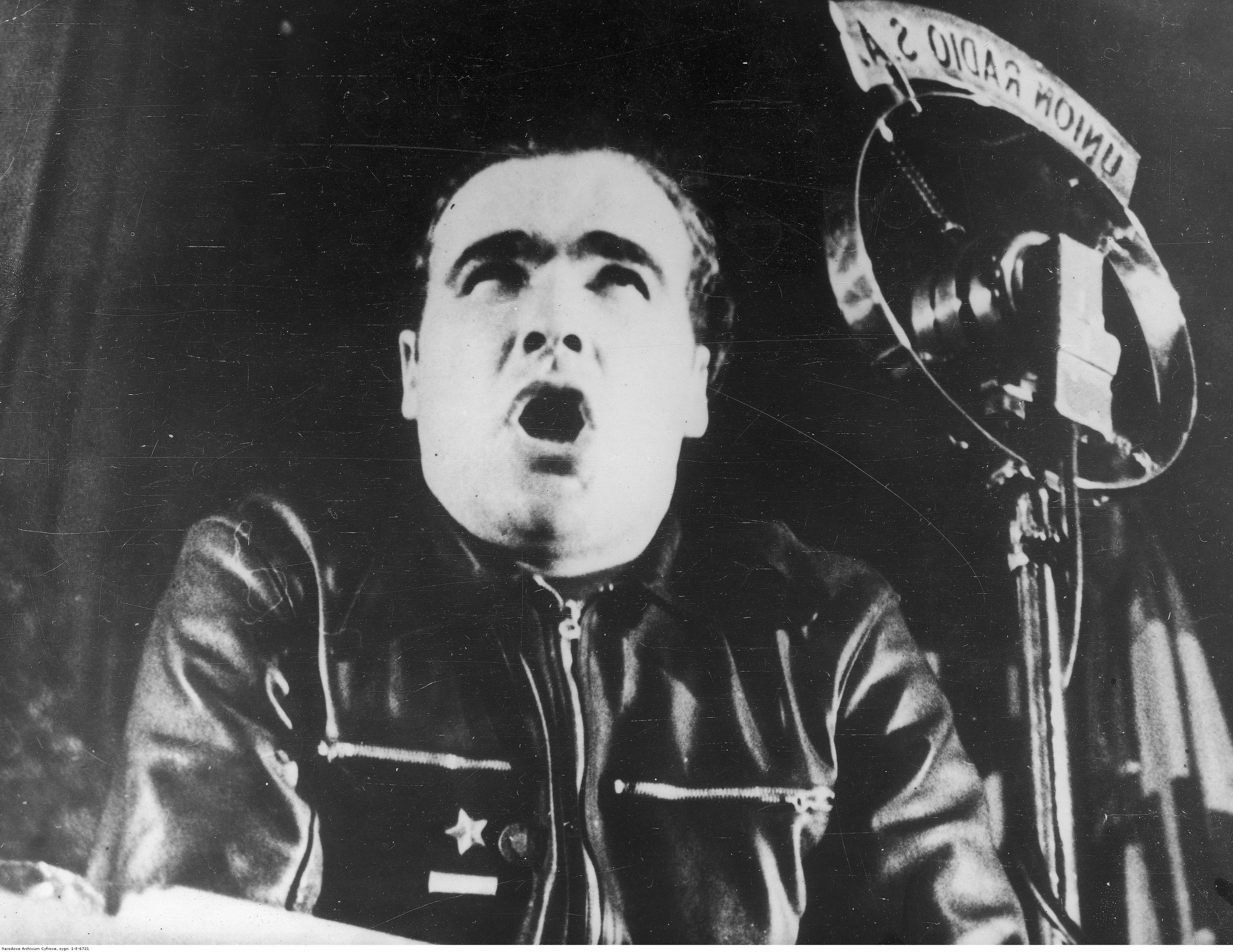 Enrique Líster hablando ante los micros de Unión Radio.